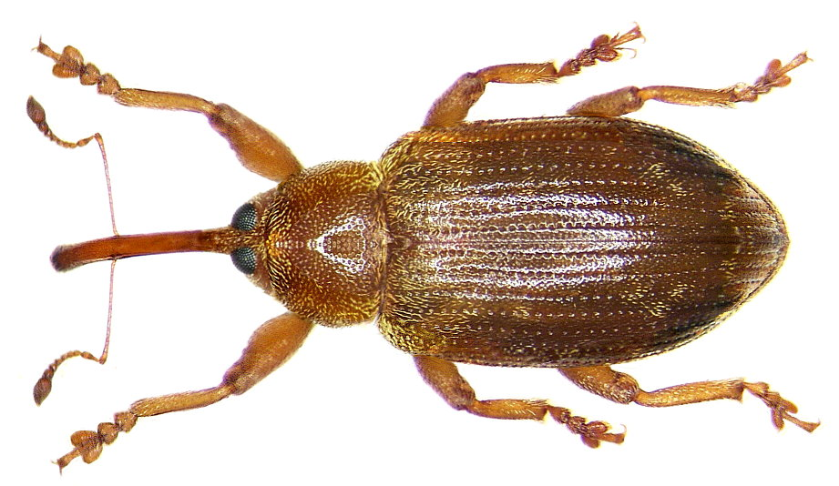 Familie: Curculionidae Groesse: 4-5,5 mm Verbreitung: Europa Ökologie: Entwicklung an Pappeln, Fundort: Germania, Bayern, Oberfranken, Kulmbach leg.det. U.Schmidt, 1975 Photo: U.Schmidt, 2005